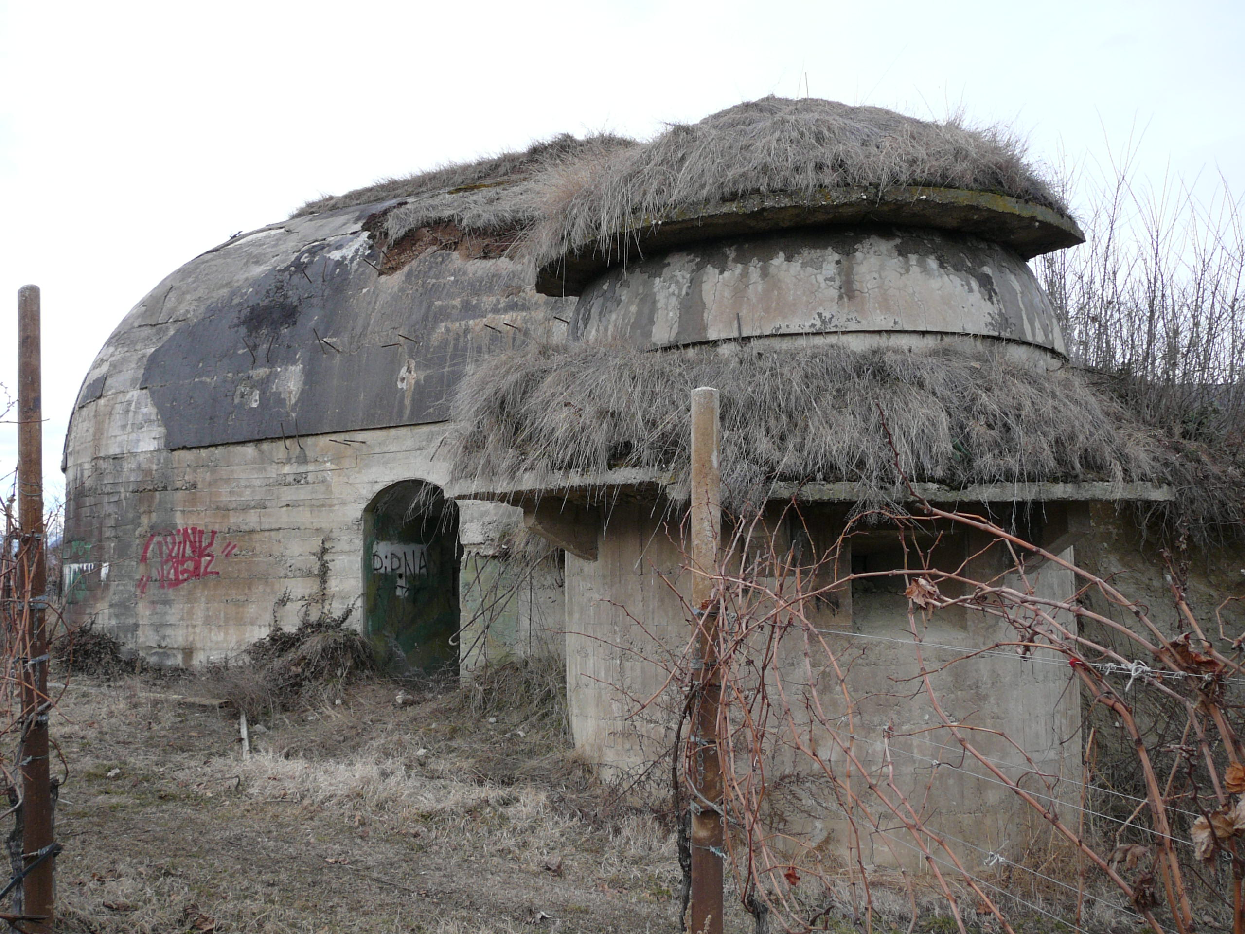 Opera 37 Bolzano